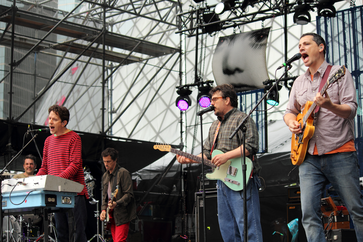 Luminato Festival, Toronto.